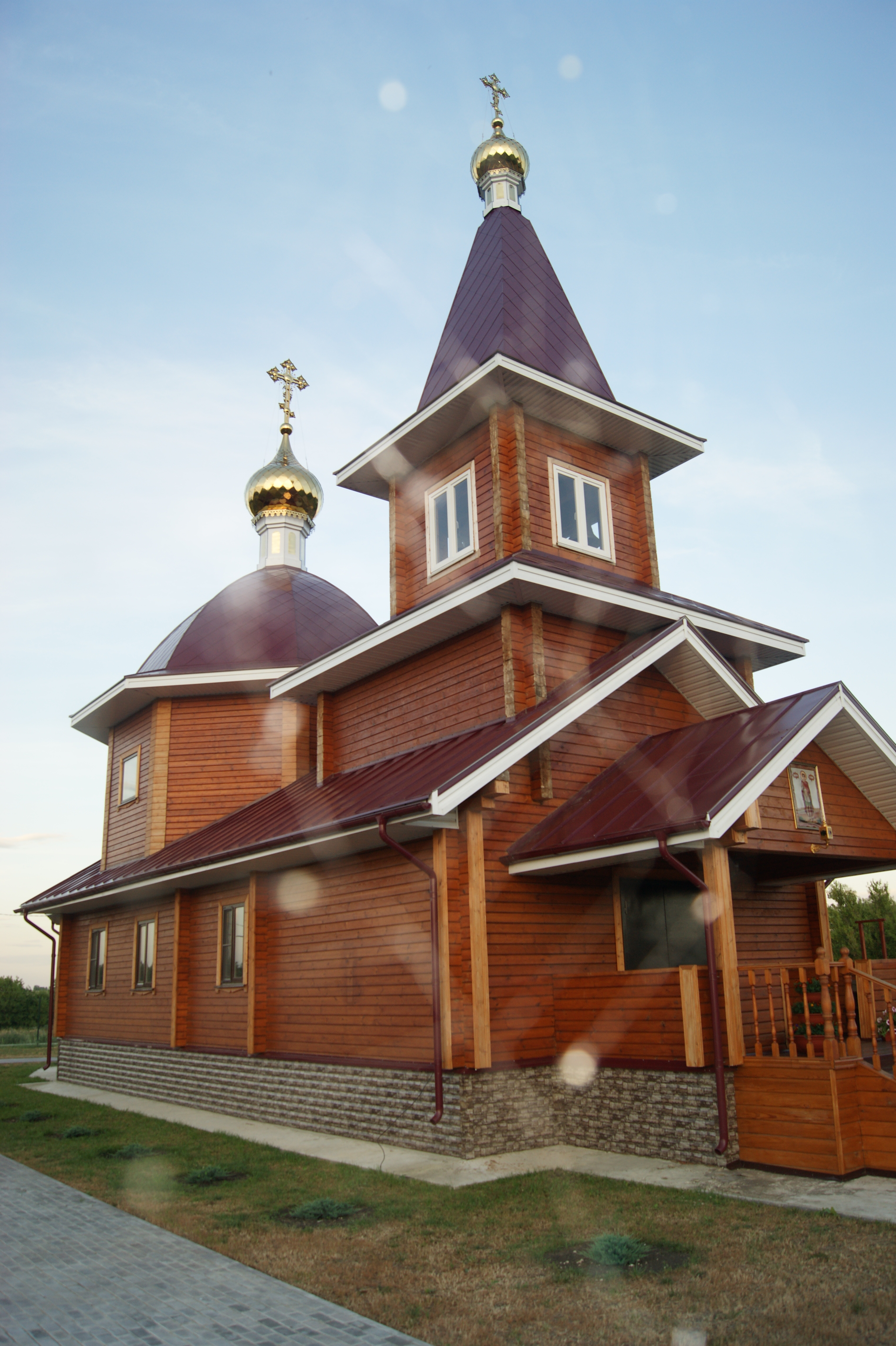 с. Ровенка Добринского района Липецкой области